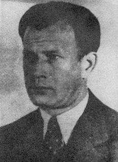 Kazimierz Szternal - "Zryw"